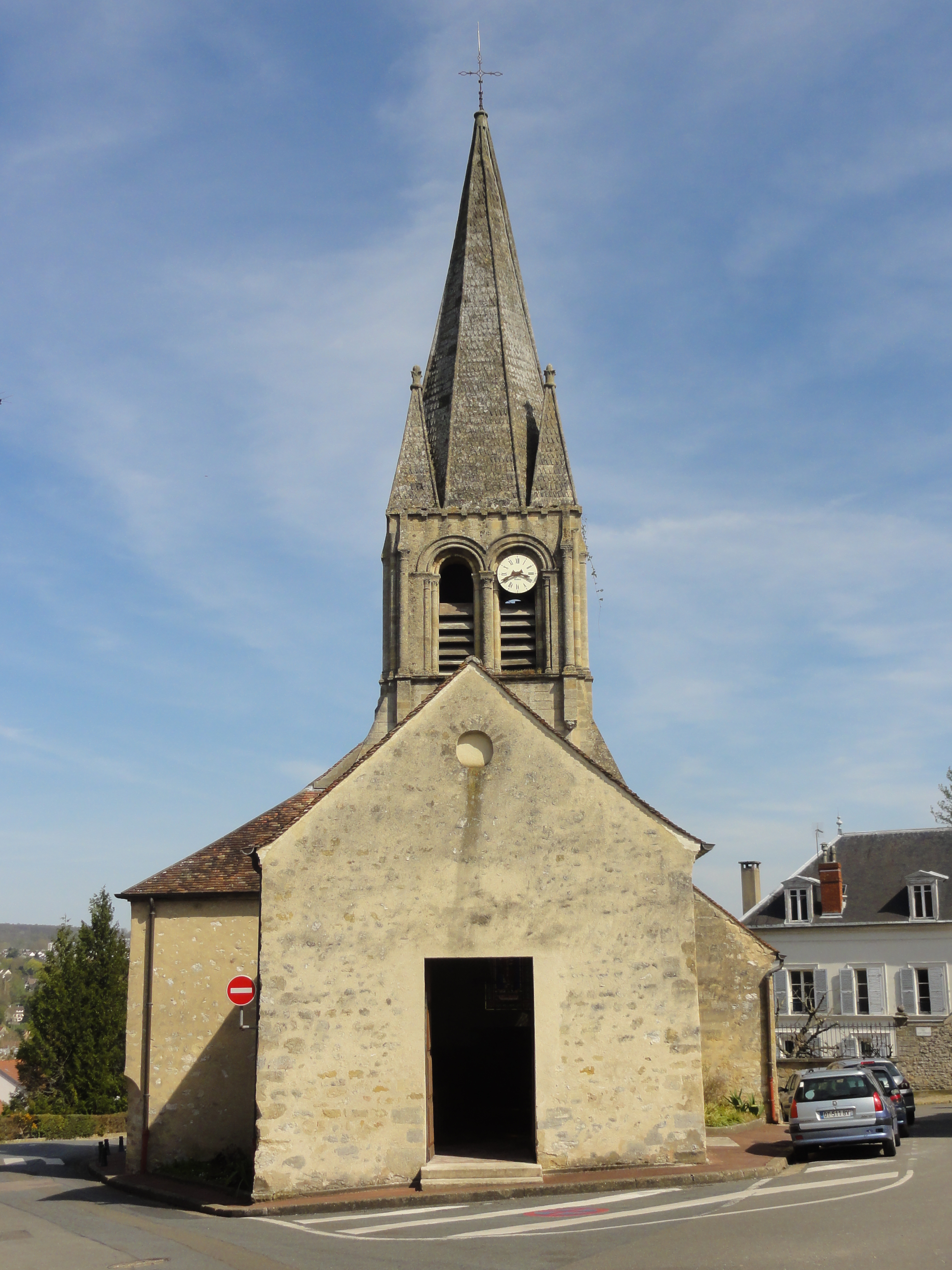 Église Saint-Germain-de-Paris de Hardricourt - voir titre.